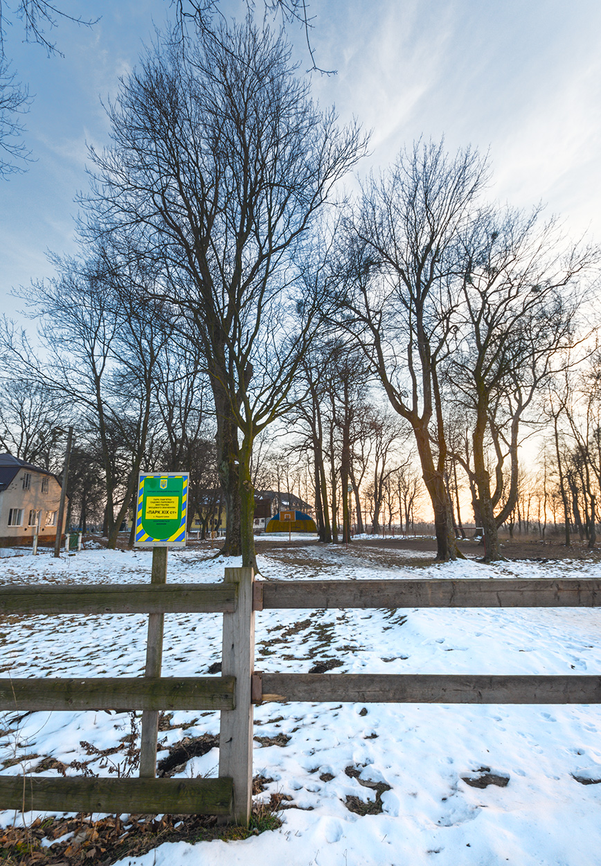 Парк ХІХ ст., Жидачівський р-н, с. Піддністряни